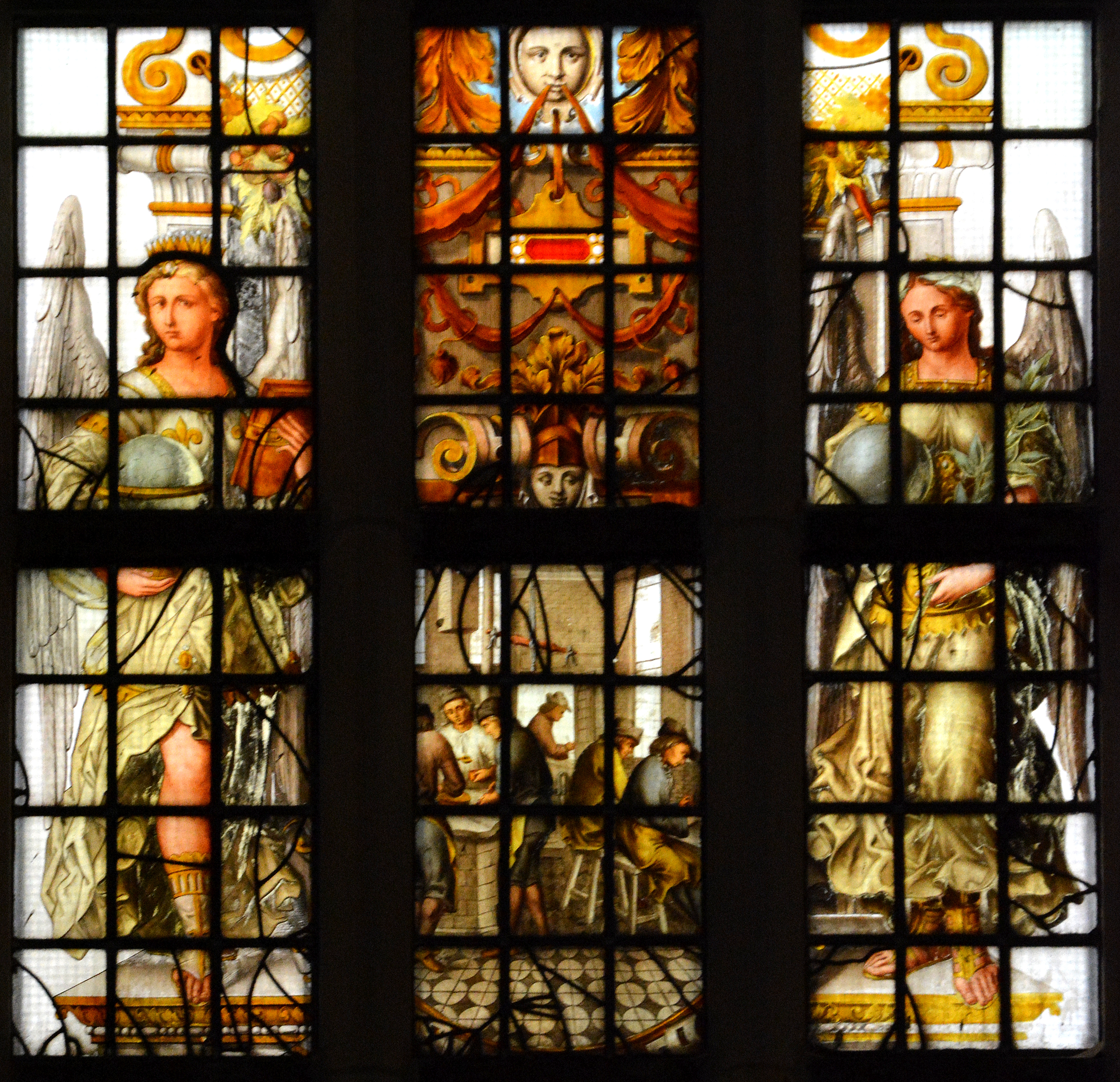 Haarlem, Grote- of Bavokerk, gebrandschilderd raam